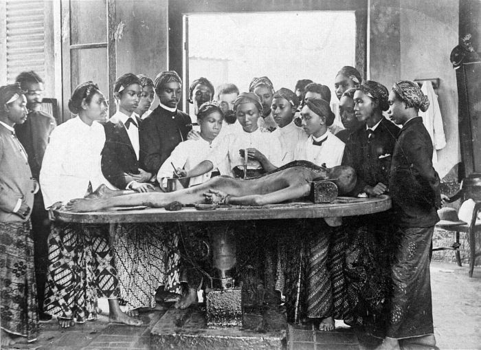 Repronegatief. Anatomische les op de dokter Djawaschool in Weltevreden, Batavia, Java